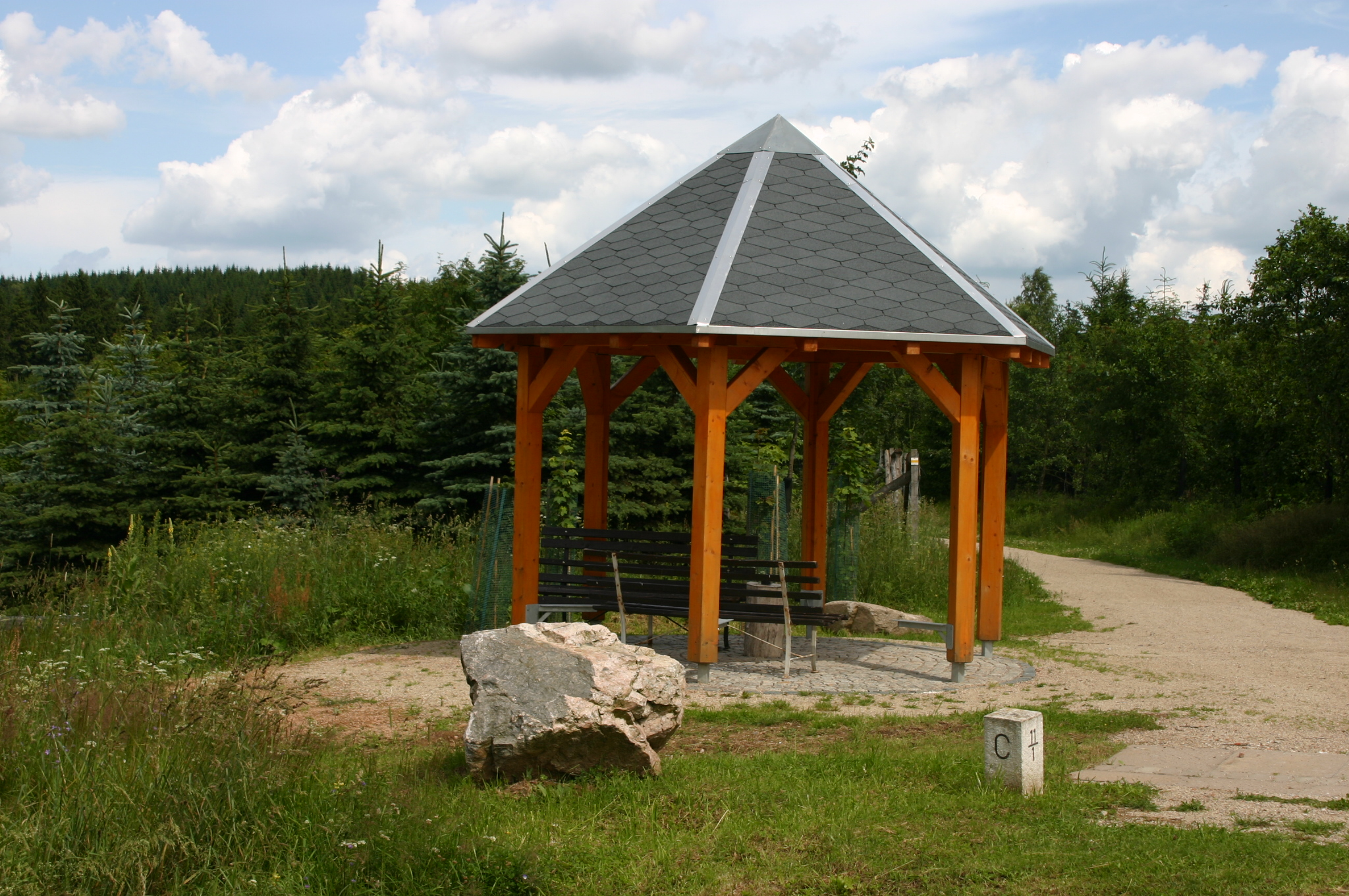 Ehemalige Ortsschaft Žebrácký roh (Battleck) im Bezirk Teplice (Teplitz), Pavillon von 2008 auf deutscher Seite